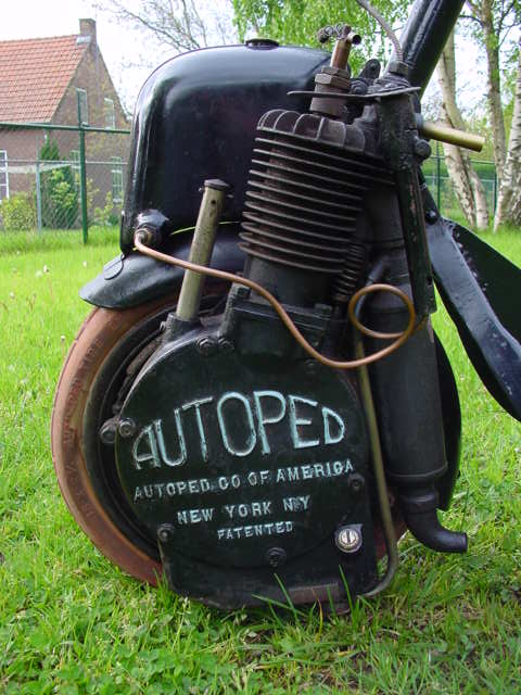 Autoped engine 1919.